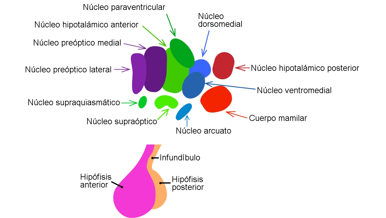 Esquema en el que se representan los diferentes núcleos que forman el hipotálamo y su relación con la hipófisis.